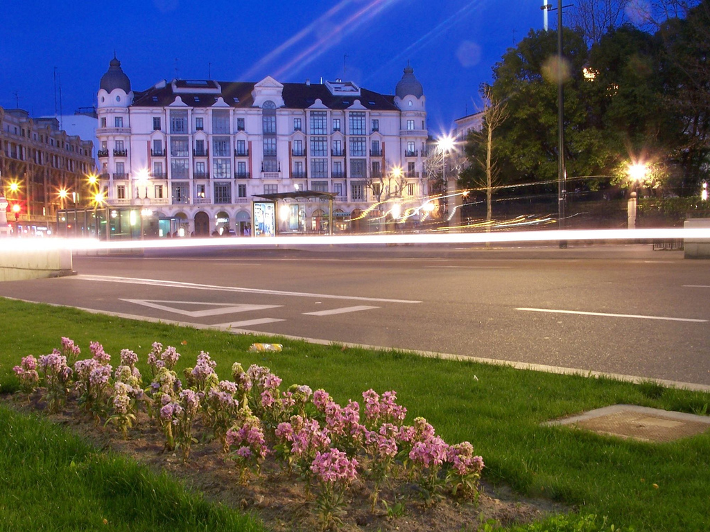 Es la casa mantilla de Valladolid, una de las primeras en tener un poco más en cuenta las medidas higiénicas y todo eso que tan poco caso se hacía antíguamente. La foto supongo que se tire mejor a la una de la mañana cuando pasan pocos coches.